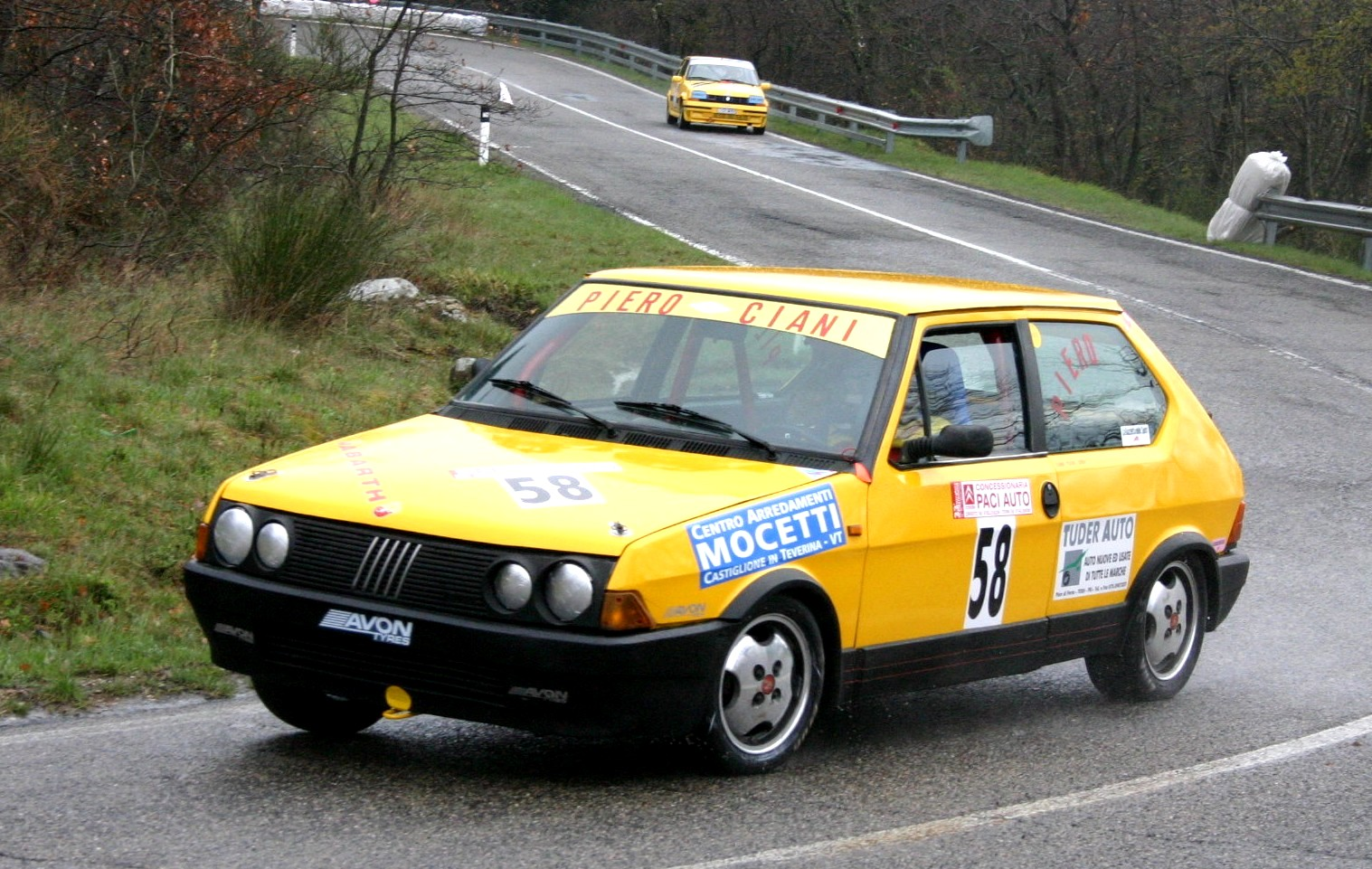 Una Fiat Ritmo Abarth 130 TC preparata per le competizioni. Foto scattata da me il 16.4.05 durante le prove della Cronoscalata della Castellana (Orvieto)